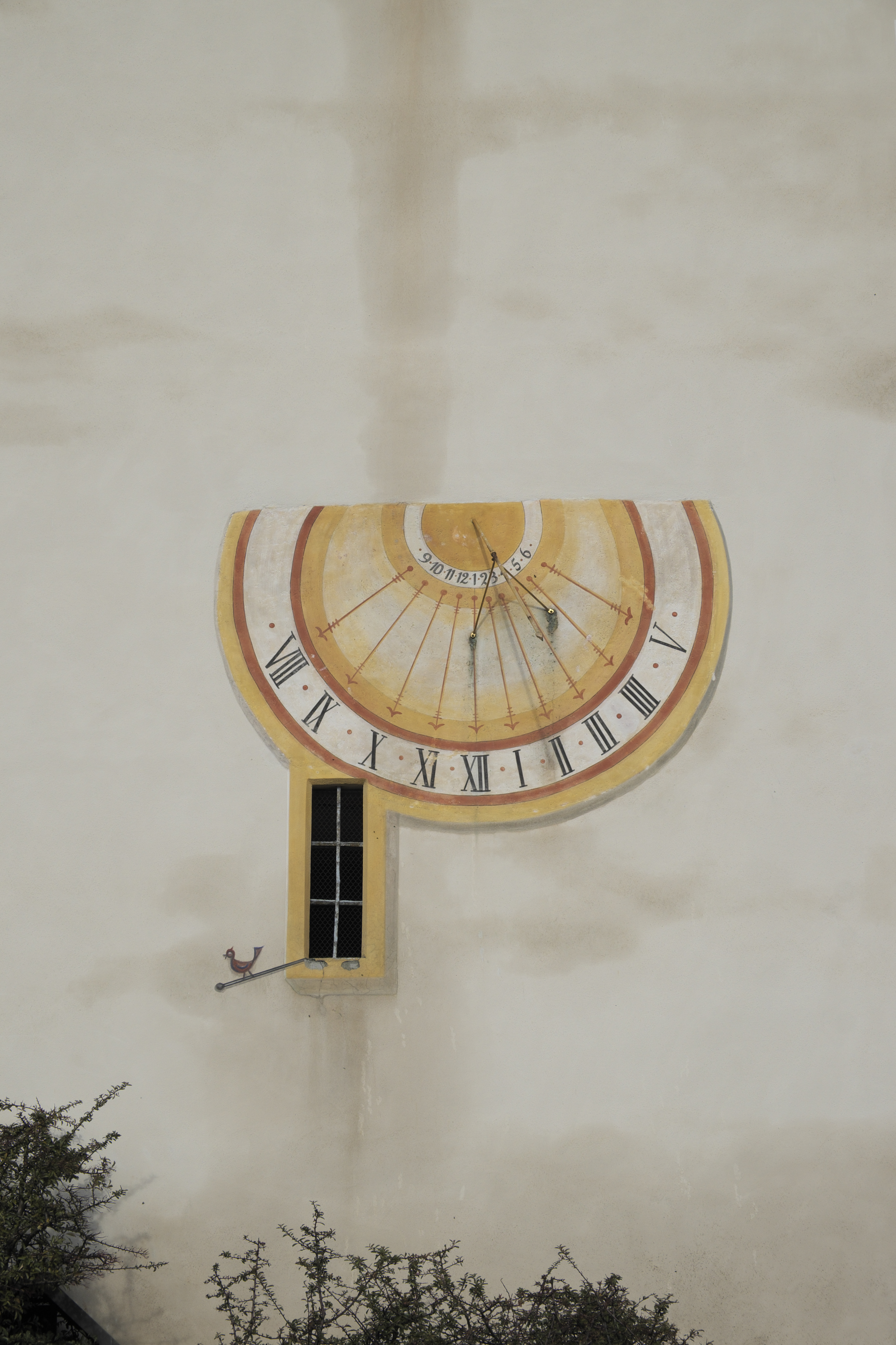 Katholische Pfarrkirche St. Laurentius in Pähl im Landkreis Weilheim-Schongau (Bayern/Deutschland), Sonnenuhr am Glockenturm